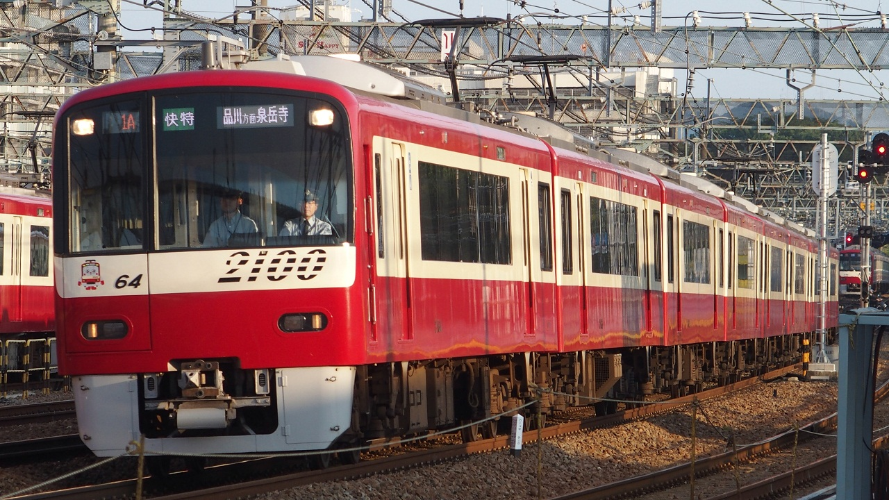 撮影地：金沢八景～金沢文庫間